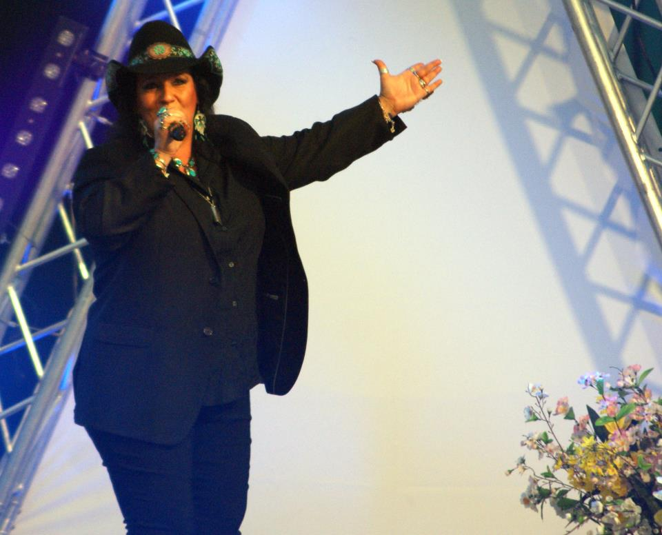 C.C.Tennissen auf der Buehne